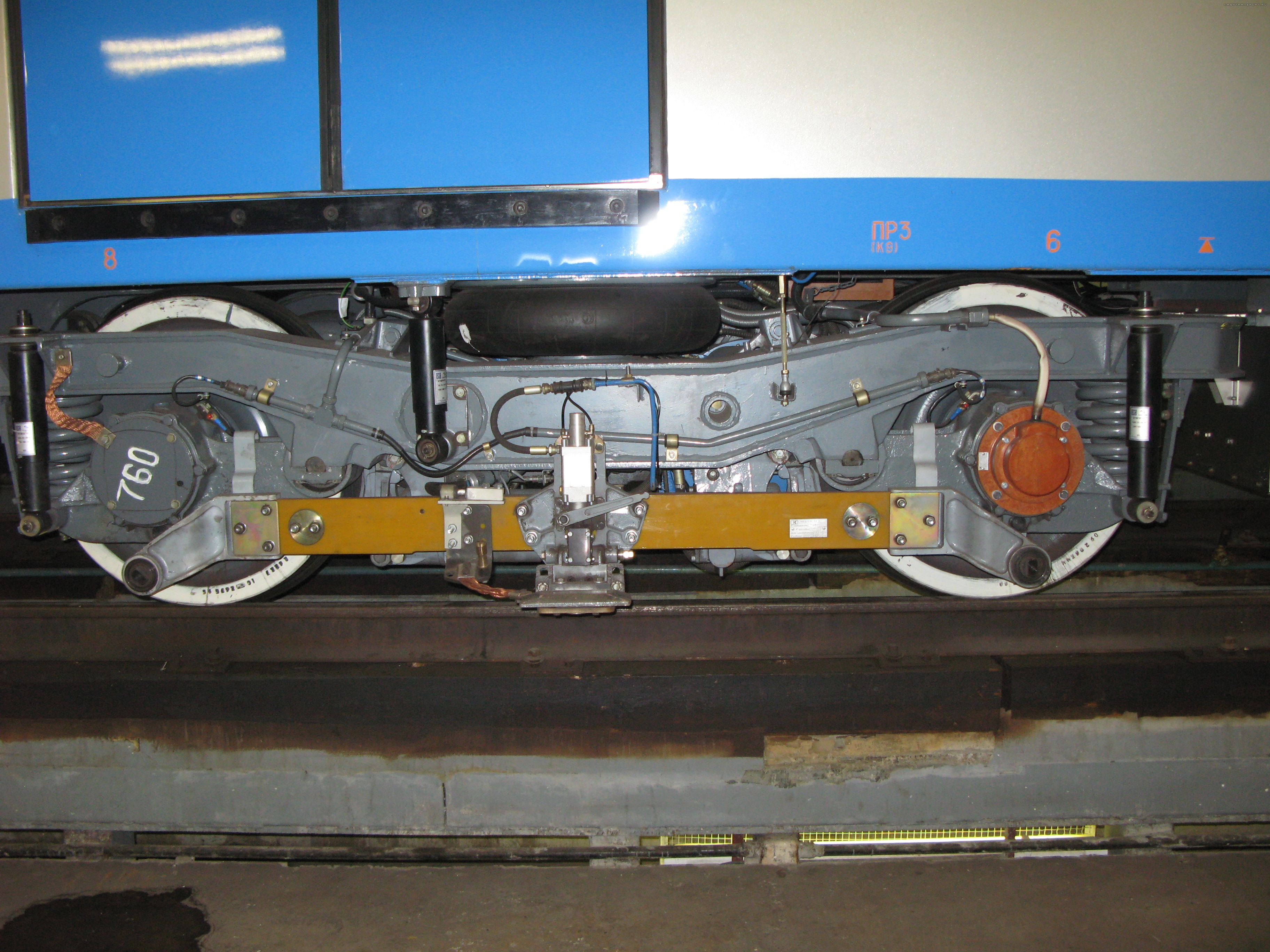 Тележка электропоезда метро 81-760-761